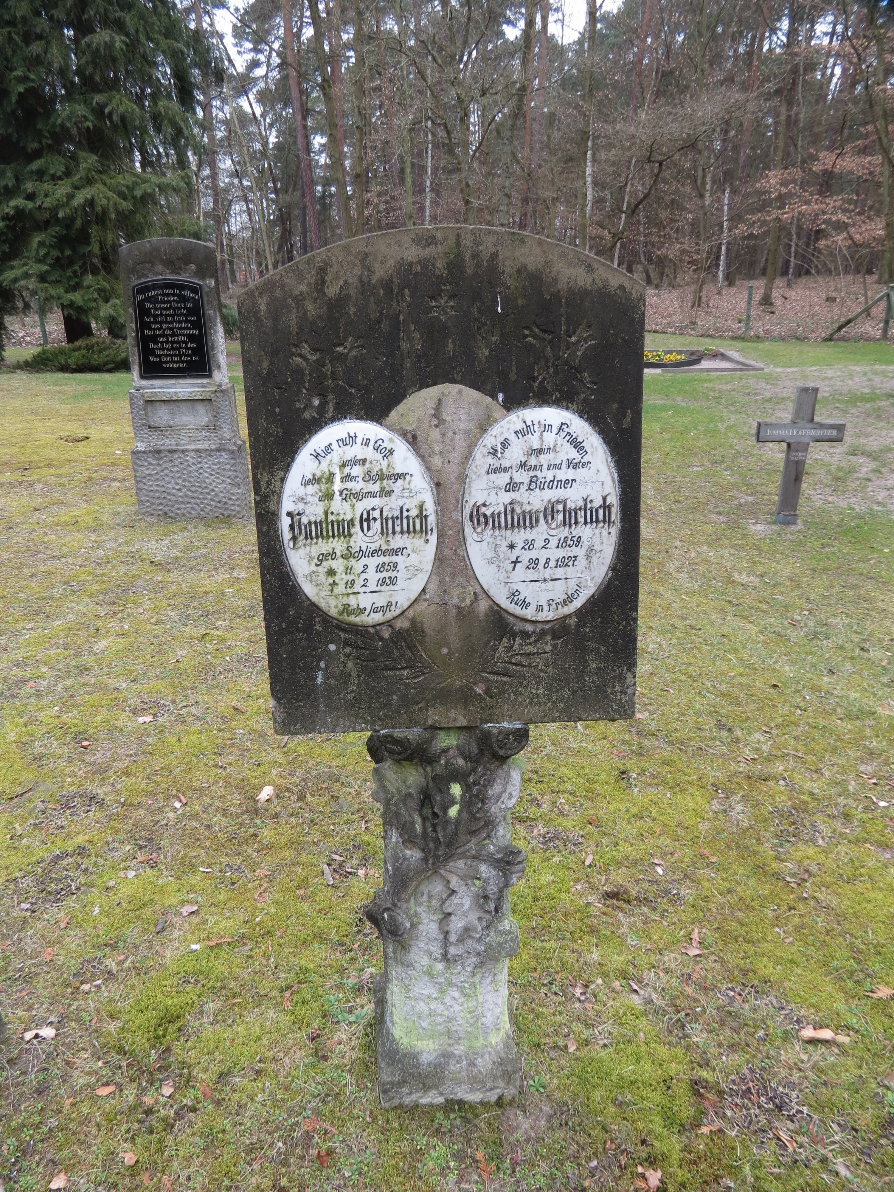 Waldfriedhof, Historisches Gräberfeld, Plattkow, Ortsteil der Gemeinde Märkische Heide, Landkreis Dahme-Spreewald, Brandenburg, Deutschland